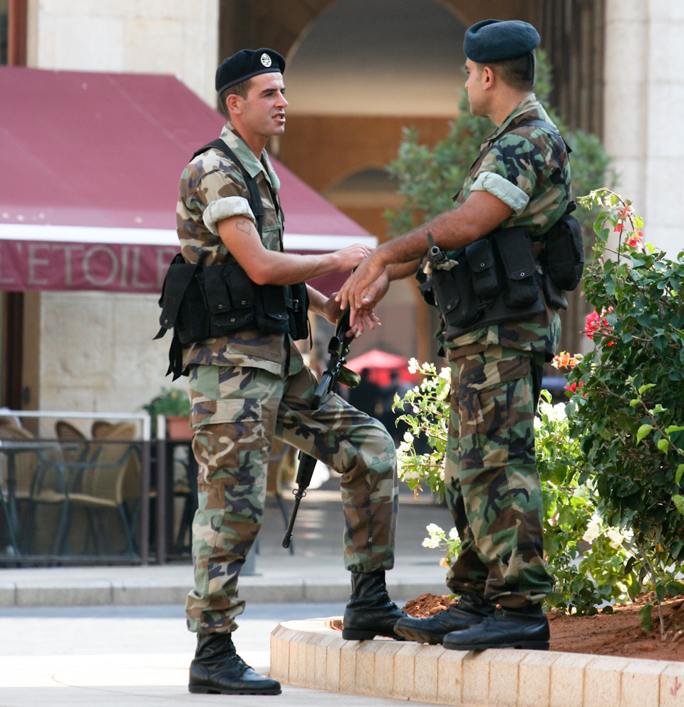 LAF guys